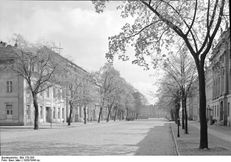 Potsdam.- Breite Straße gegenüber Lustgarten und Stadtschloß